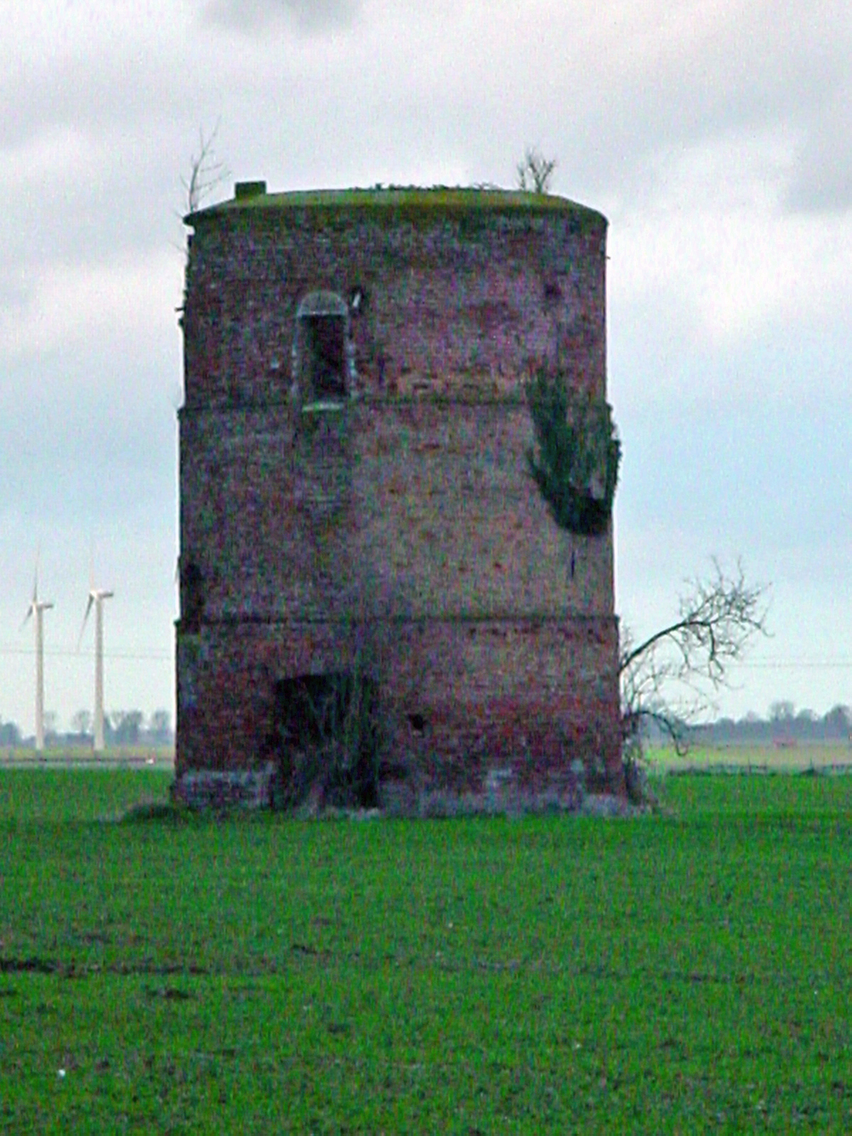 Vieux_Moulin_d'Oisemont_,_en_Decembre_2007(Somme(80)-france)_